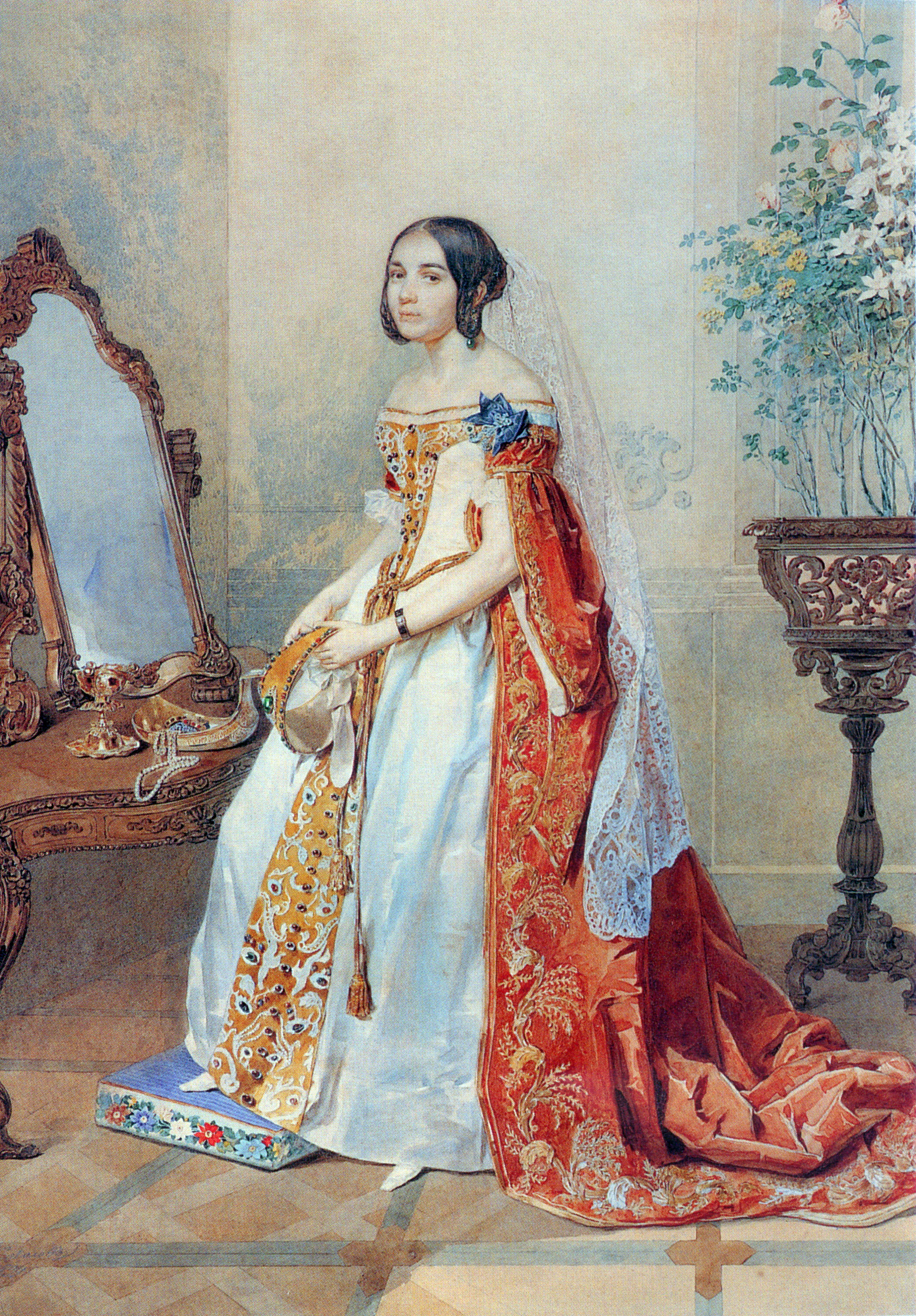 М.П.Кикина (1816-1856) в замуж. Волконская, изображена в русском придворном платье фрейлины.